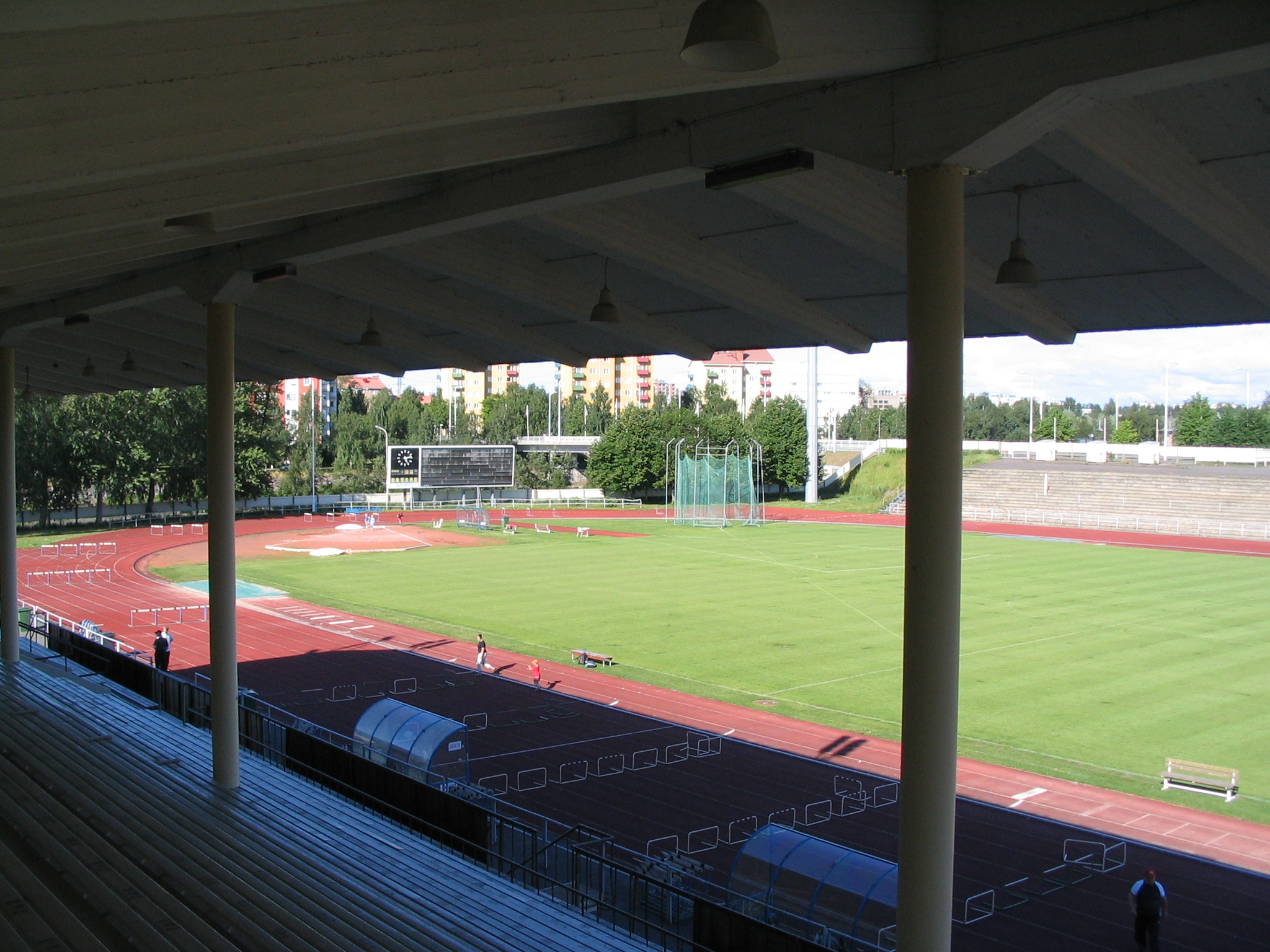 Raatin stadion 26.7.2005